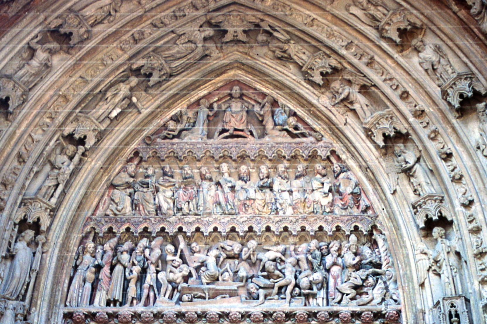 Schwäbisch Gmünd, Heilig-Kreuz-Münster. Tympanon "Jüngstes Gericht" am südlichen Chorportal. Entstanden um 1360 vermutlich durch Bauhütte der Familie Parler